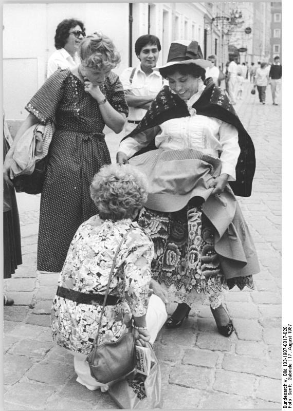 Berlin, FDJ-Liedersommer, Sängerin aus Peru ADN-ZB Senft 17.8.1987 Berlin: Liedersommer-Die Sängerin Martina Portocarraro aus Peru ist Gast beim diesjährigen FDJ-Liedersommer. Zu ihrem Berlin-Besuch gehörte auch ein Bummel durch das Nikolaiviertel, wo die aus sechs Röcken bestehende Volkstracht der Künstlerin viel frauliches Interesse fand.